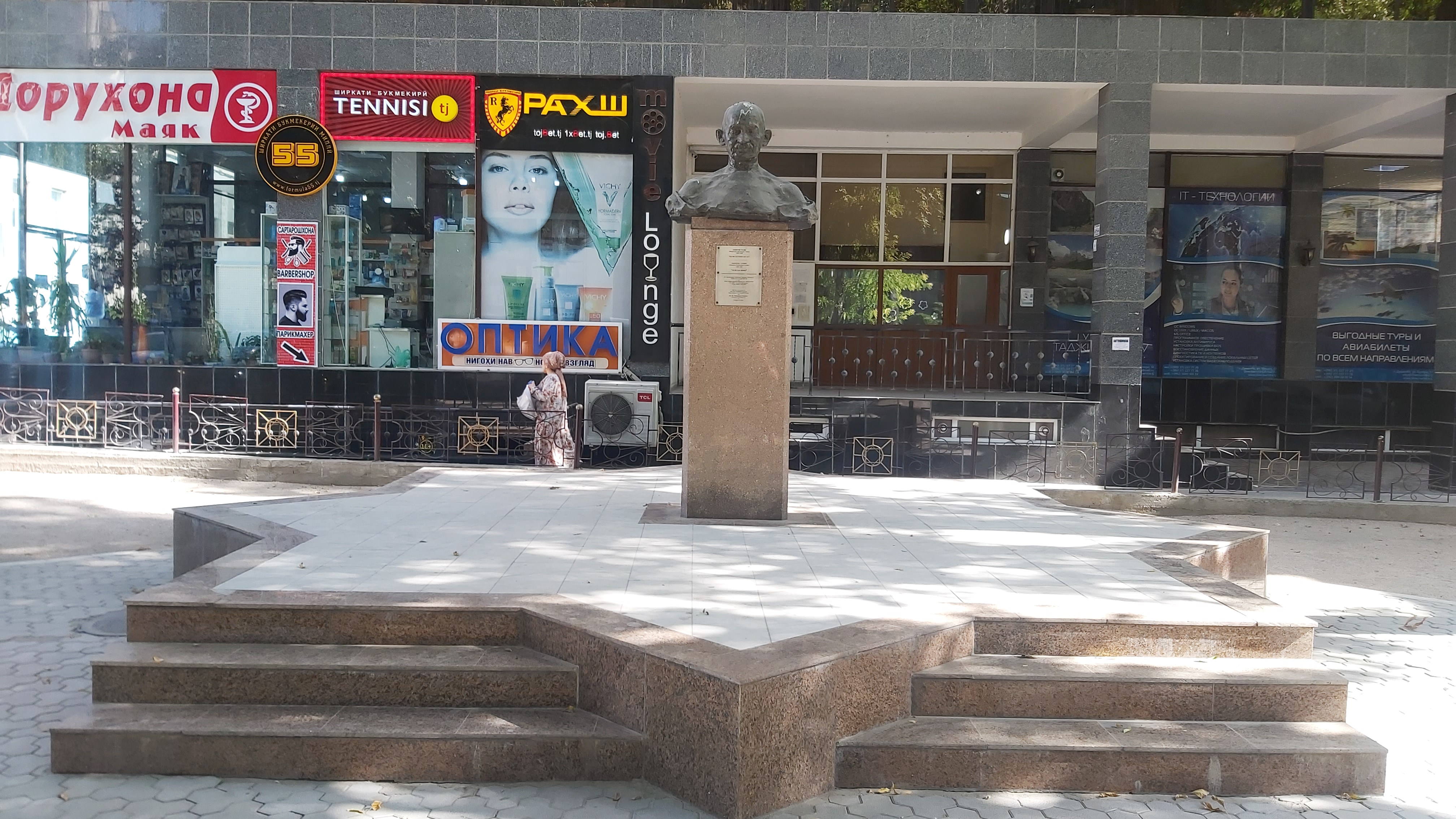 Памятник Махатме Ганди